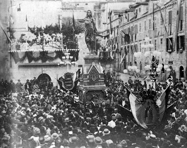 dominio público